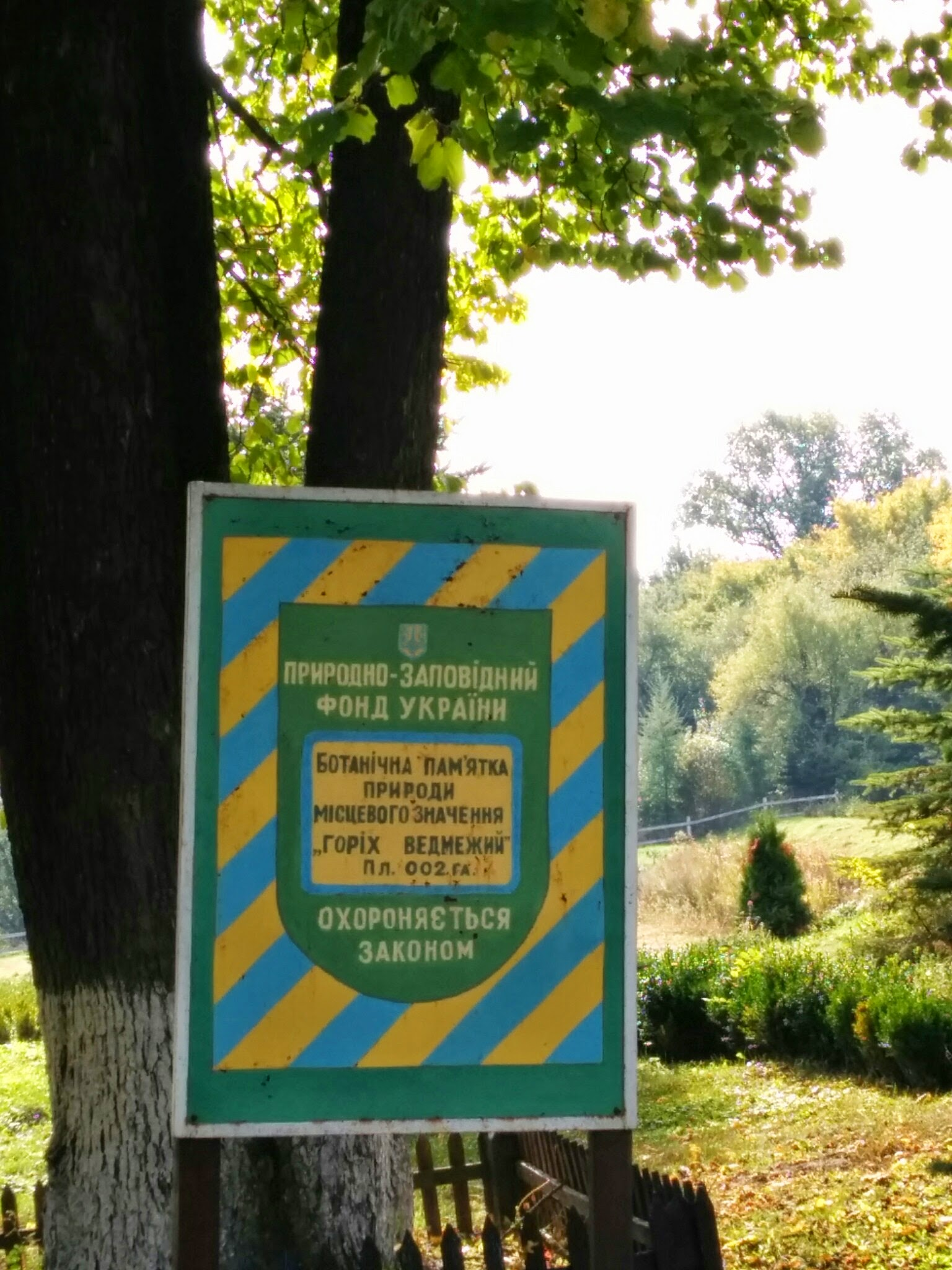 «Горіх ведмежий № 2», Теребовлянський район, с. Кровинка, Теребовлянське л-во, кв. 80 в. 12, садиба лісництва